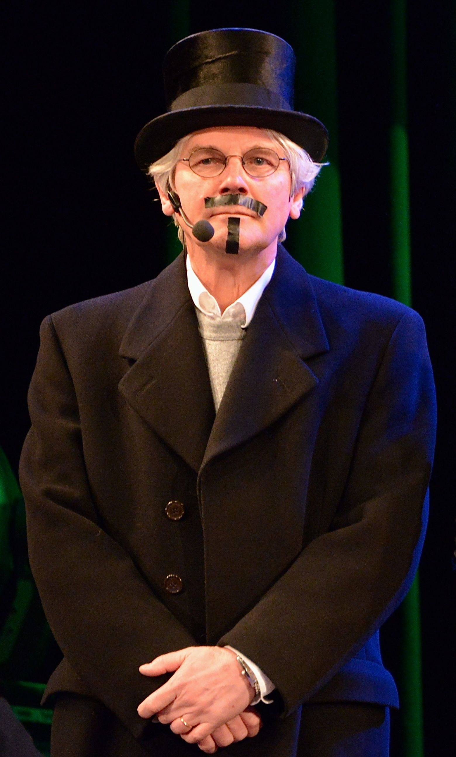 Bengt Järnblad i ett framträdande under Strindbergsårets sista dag, den 20 januari 2013 i Kulturhuset i Stockholm.